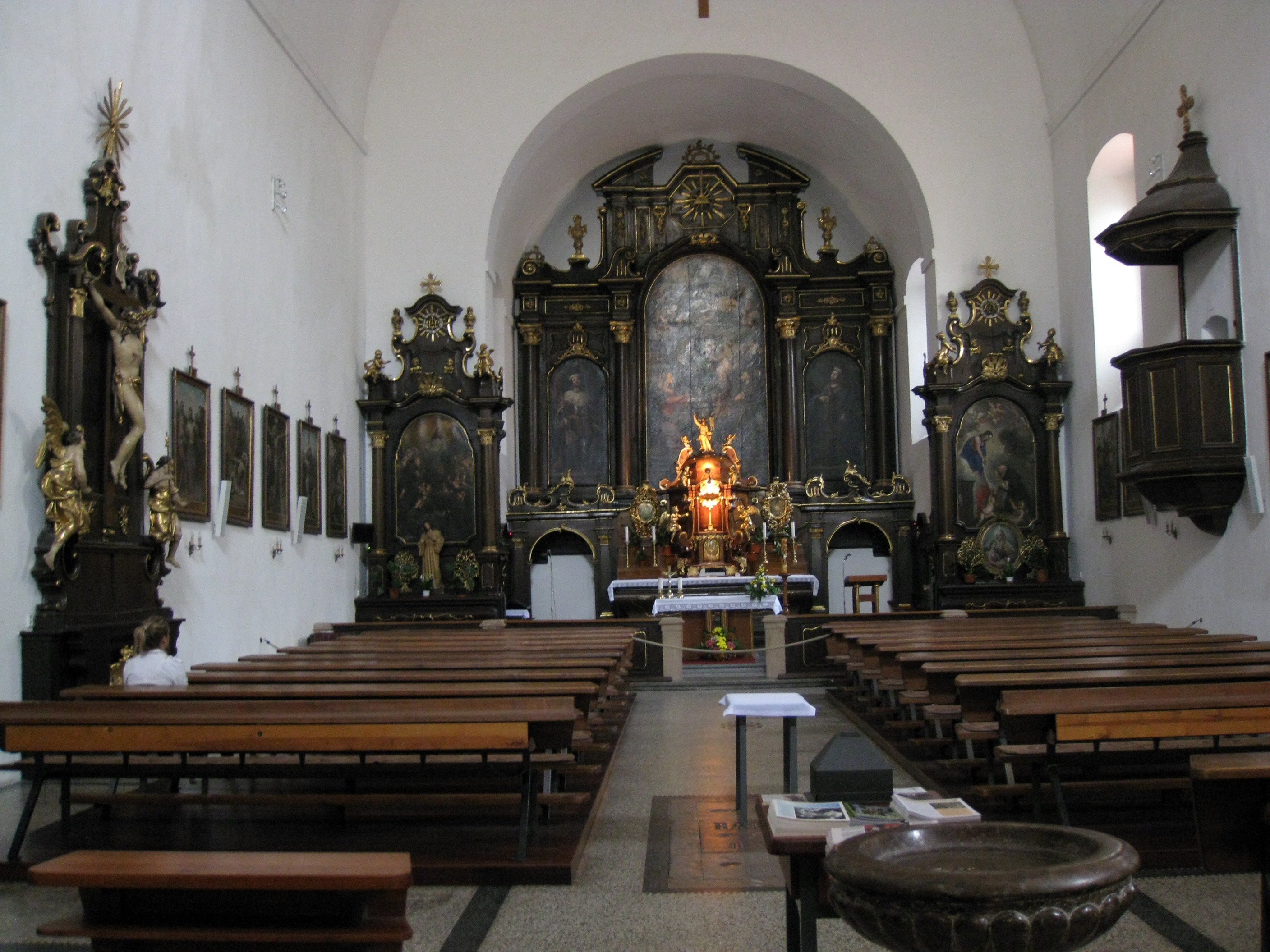 Klášter kapucínů, Praha 1, nám. Republiky 1077/2